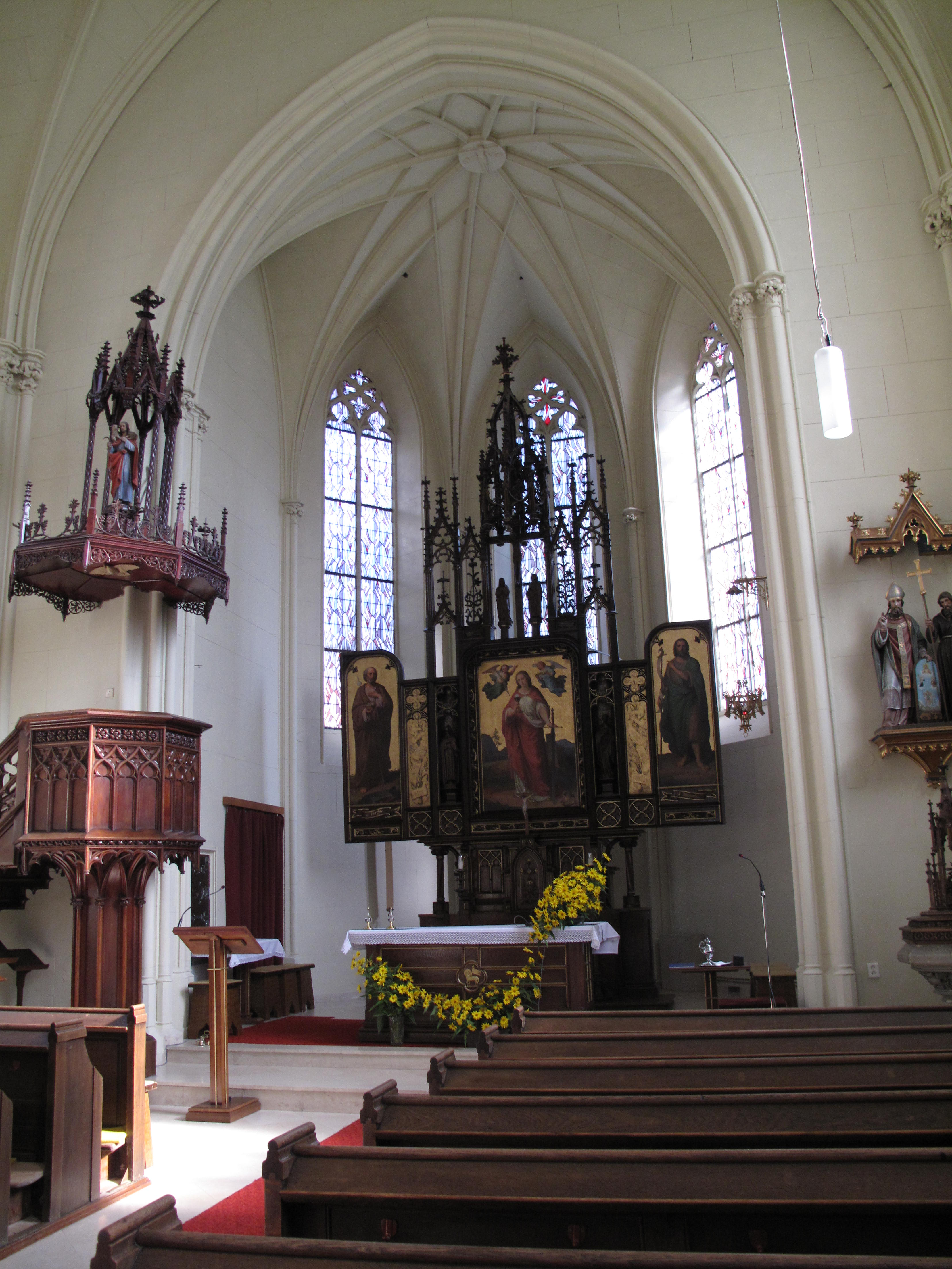 Adamov, kostel sv. Barbory